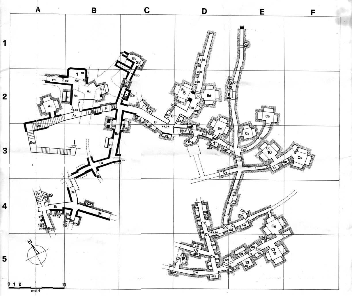 Opera pubblicata agli inizi del secolo.